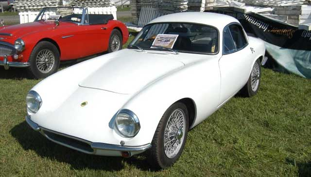 Lotus Elite '60